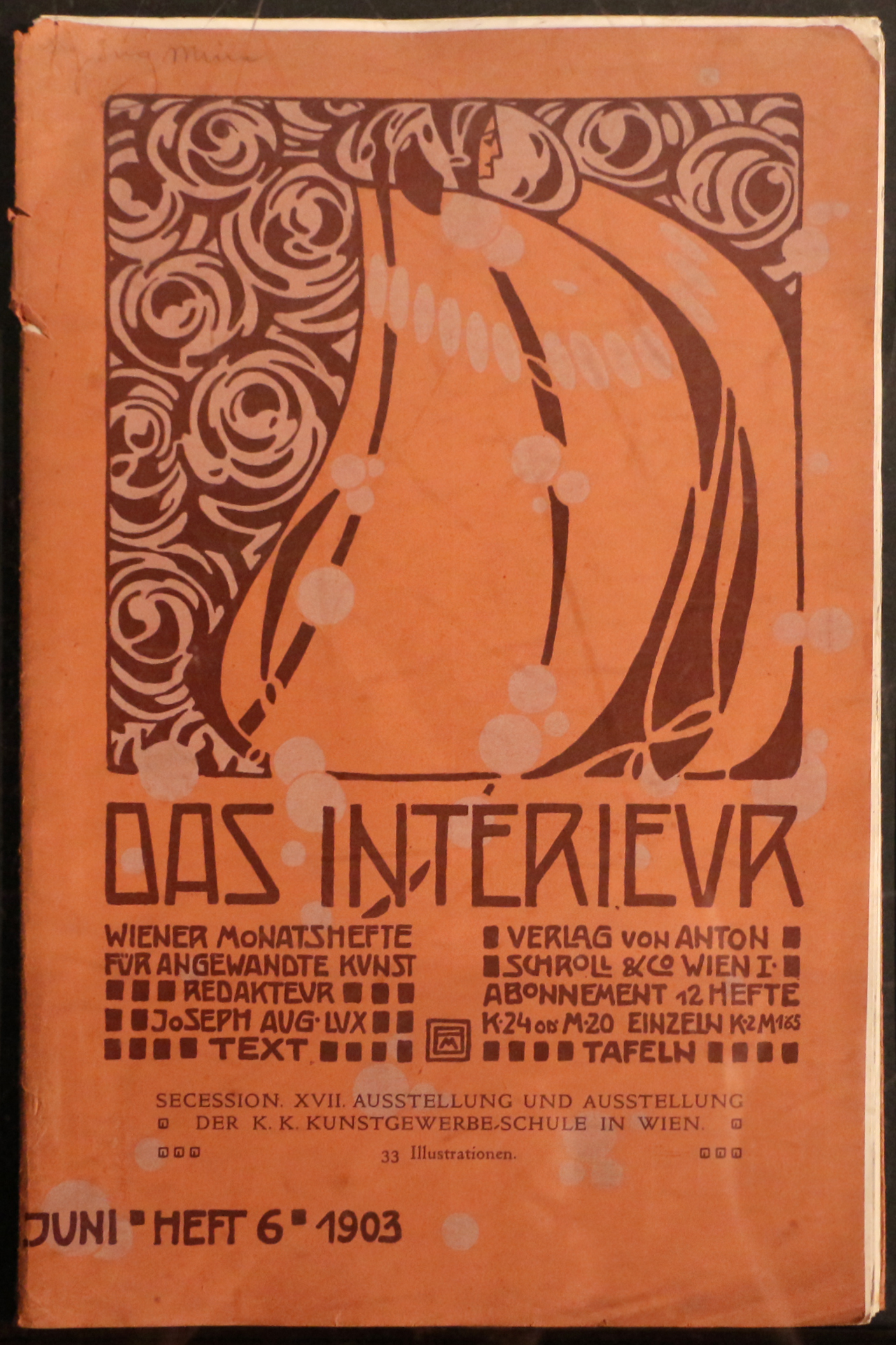 Il parco e i musei di Nervi This is a photo of a monument which is part of cultural heritage of Italy.